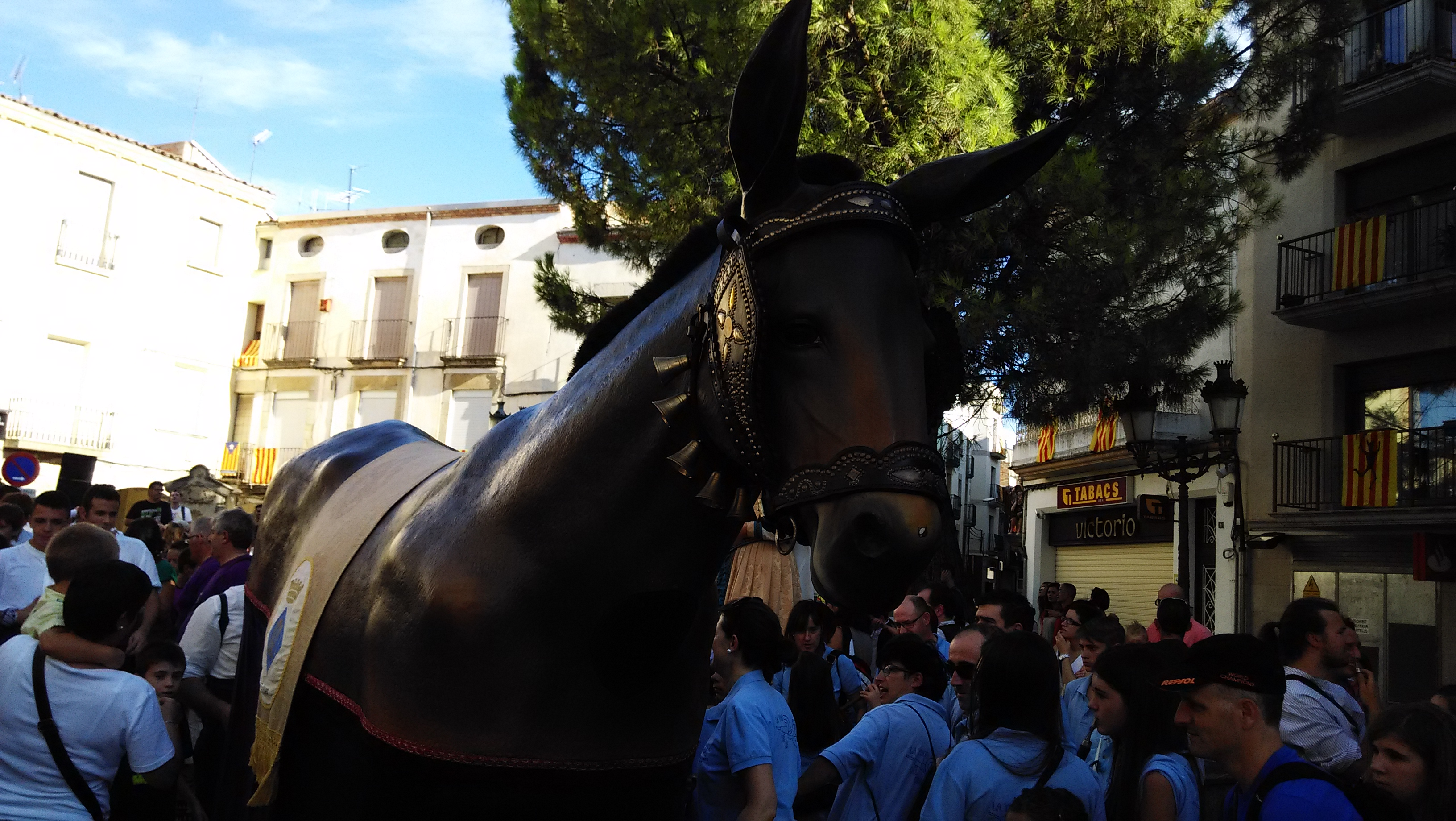 Trobada gegantera a la Festa Major de Bellpuig 2014. La mulassa